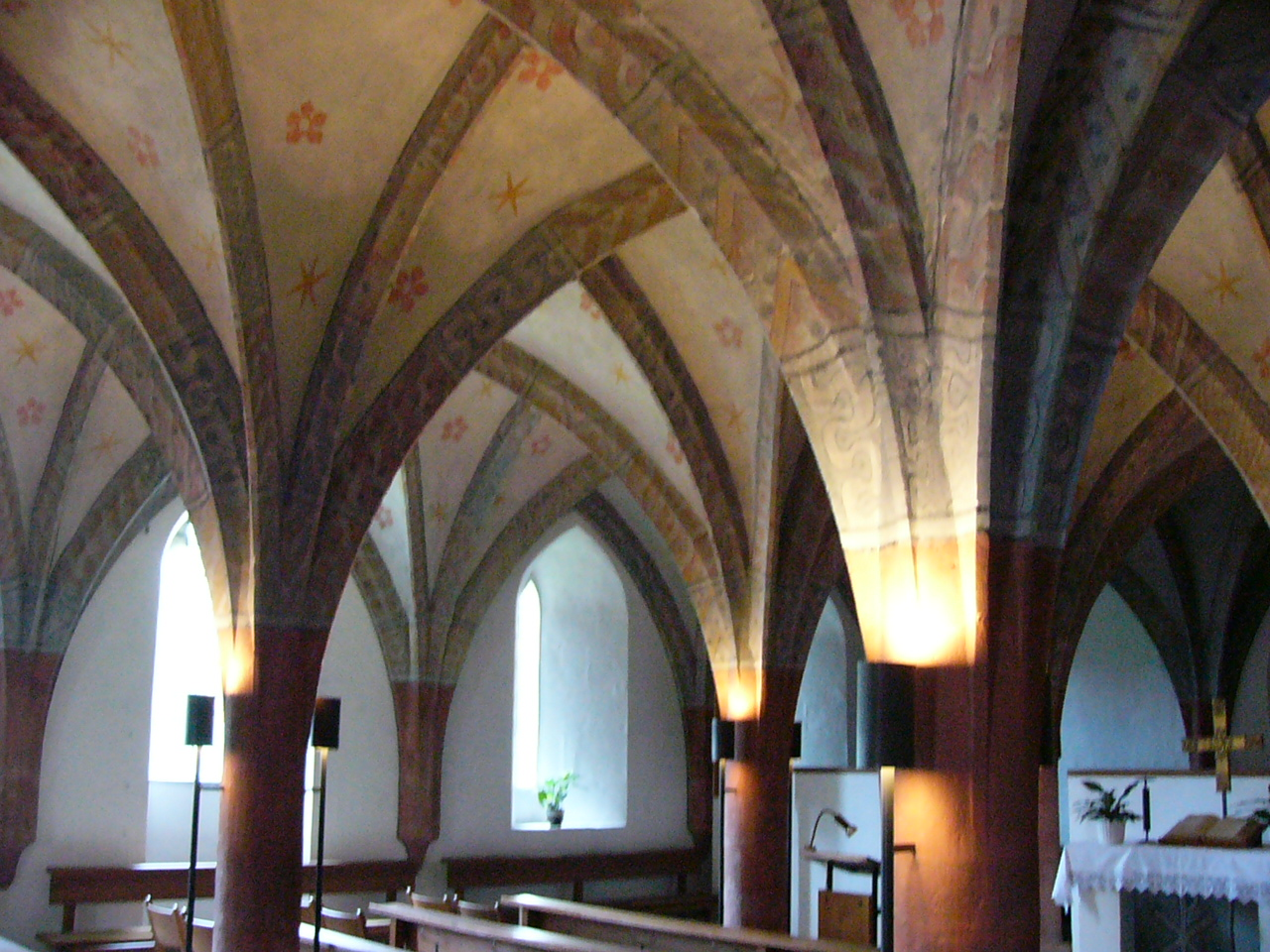 Gewölbe der sogenannten Ritterkapelle in Himmelkron